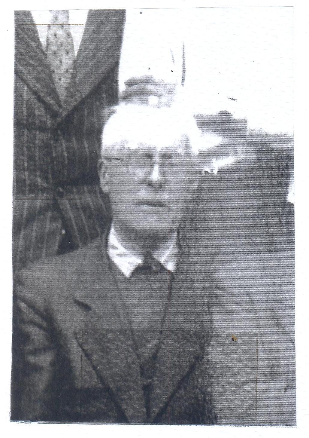 un ritratto